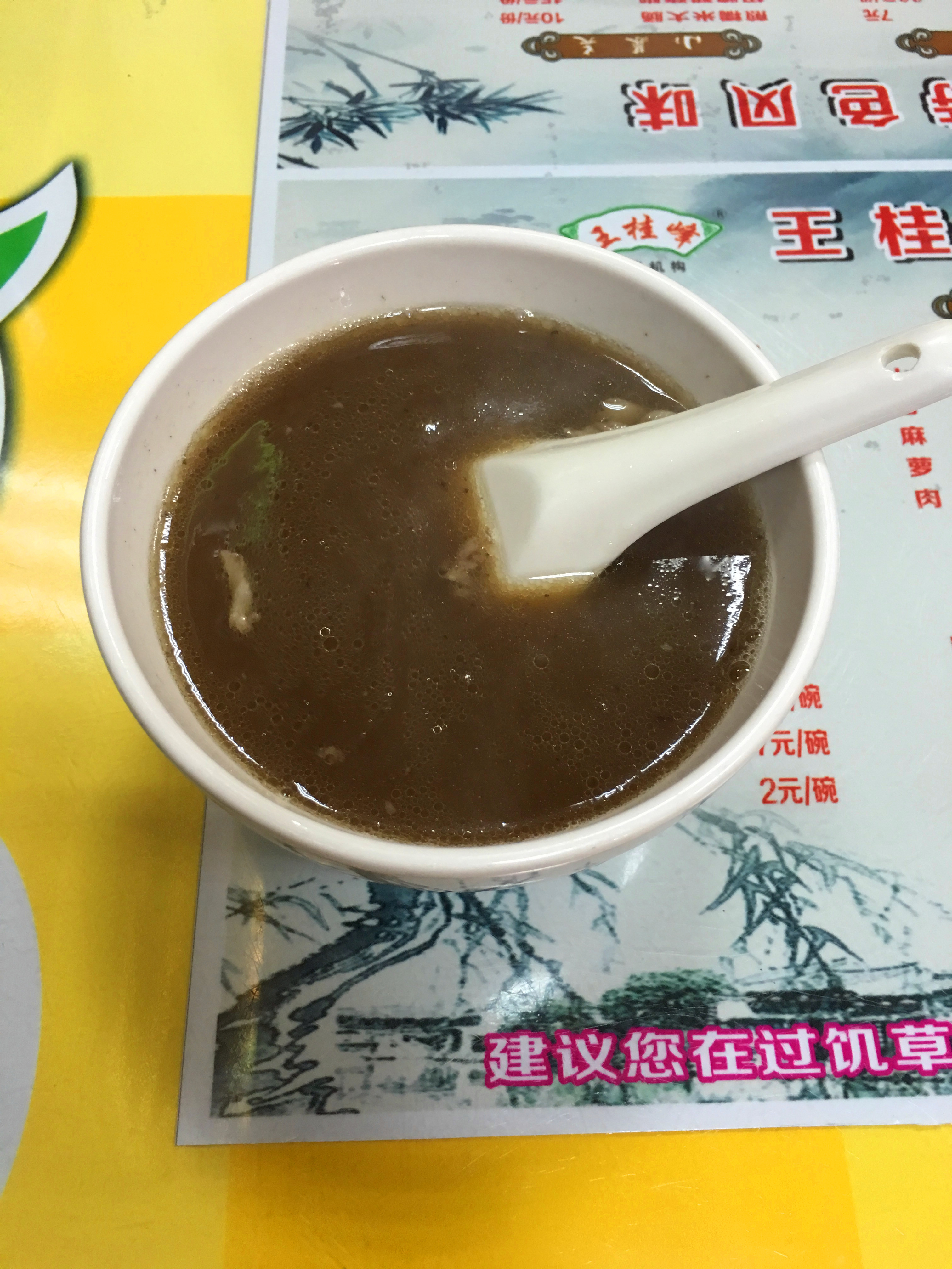 中文（中国大陆）: 德化县特色小吃——过饥草汤